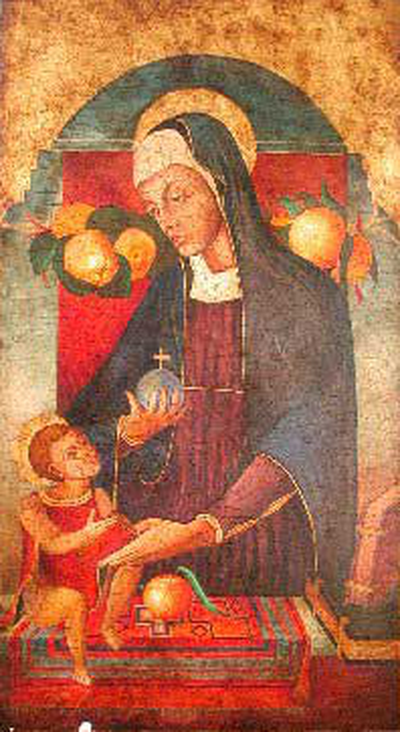 Bogorodica s djetetom, Juraj Ćulinović, 1460.-1470.g., Šibenik, Gradski muzej